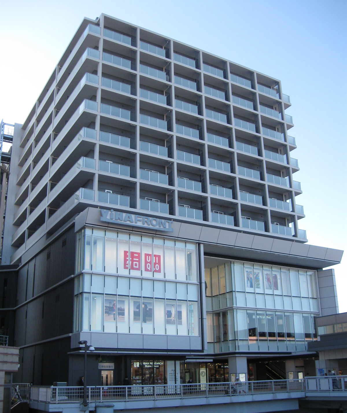 ビナフロント（神奈川県海老名市）